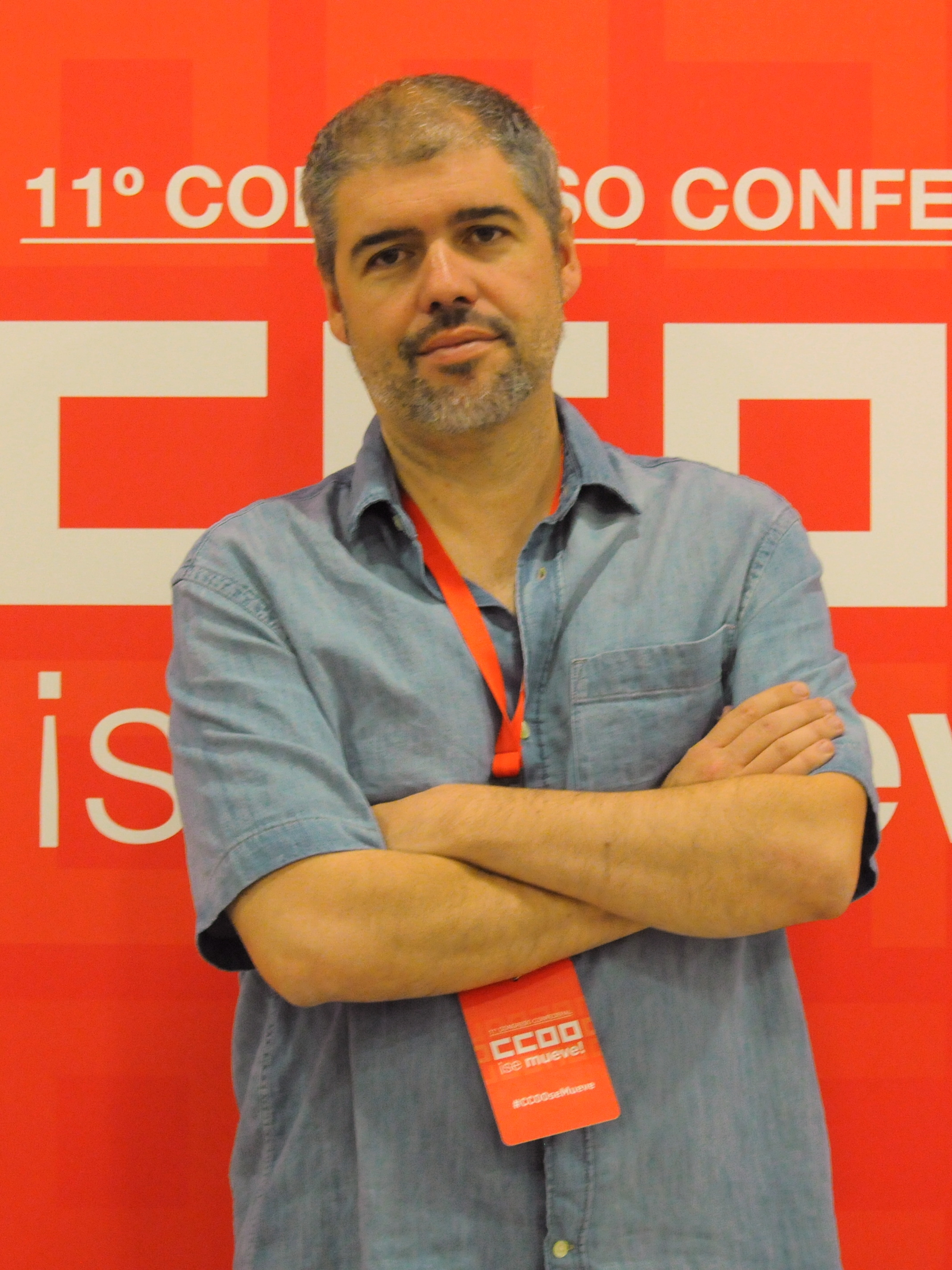 Unai Sordo nuevo Secretario General de CCOO